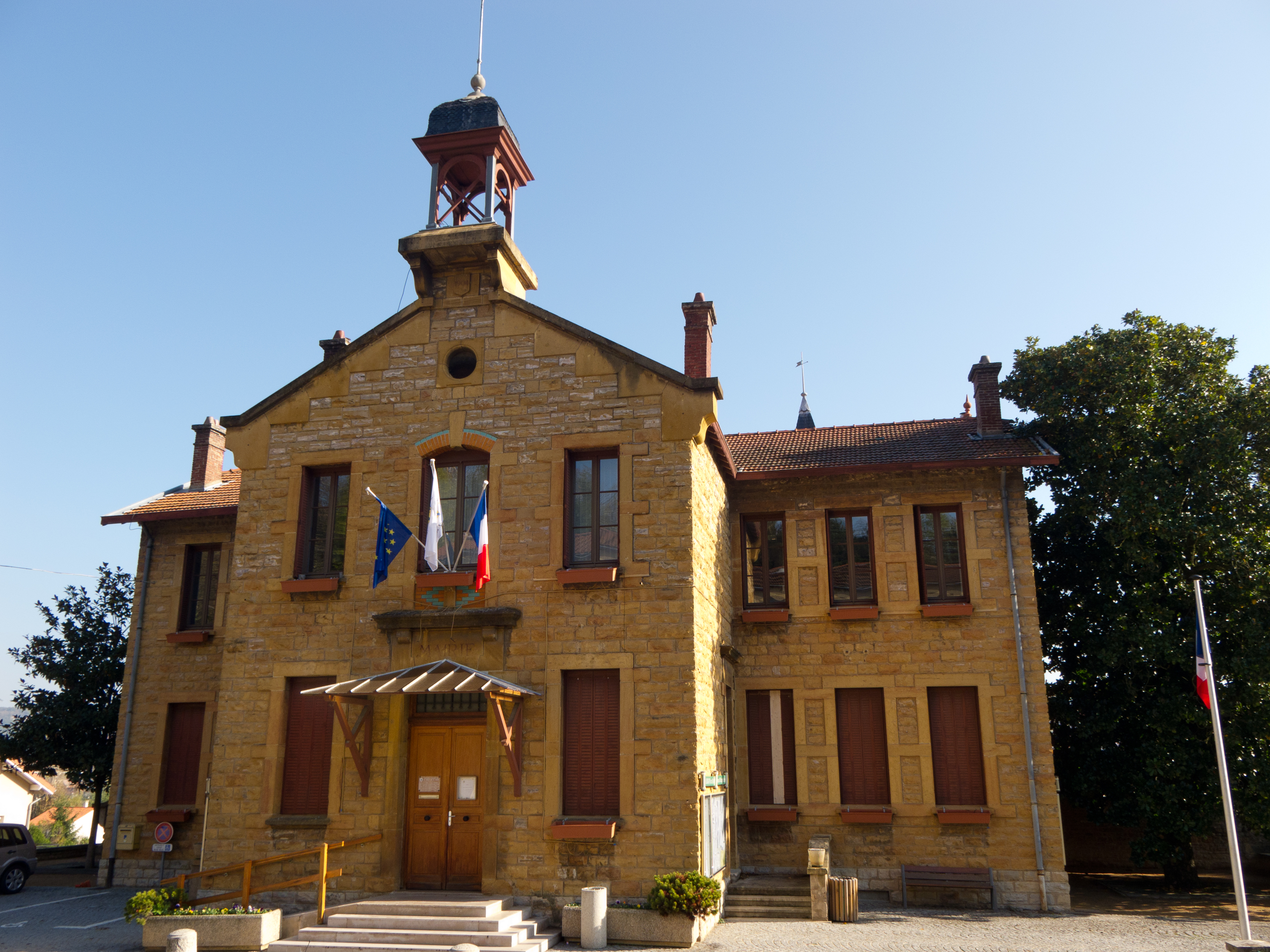 Mairie d'Albigny-sur-Saône - Albigny-sur-Saône, Rhône, France.